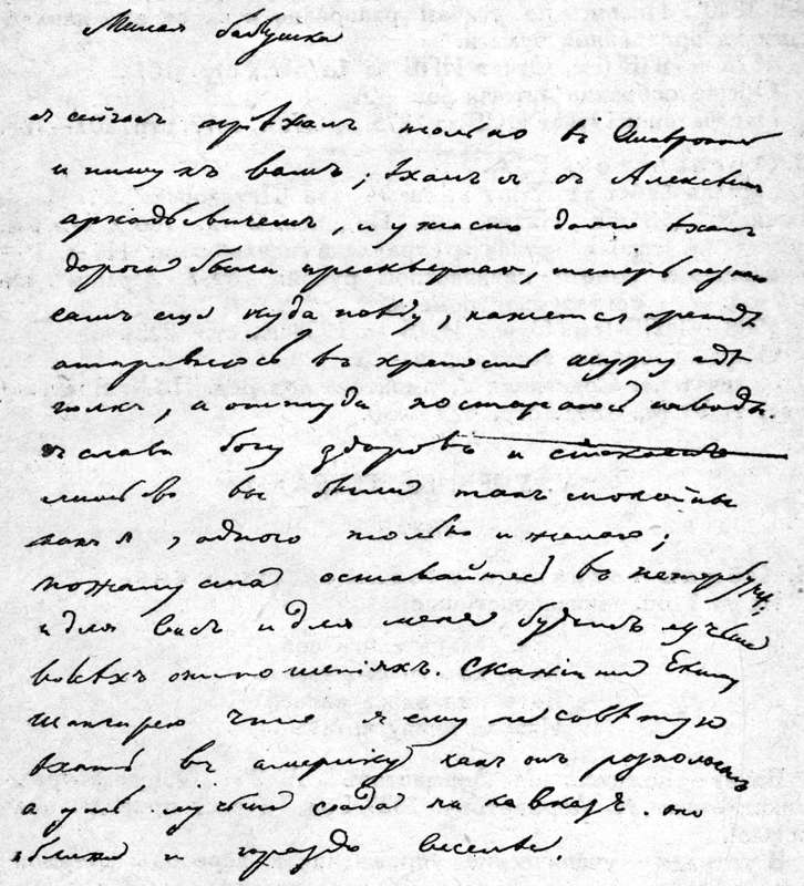 Letter grandmother Lermontov EA Arsenyev on May 9, 1841